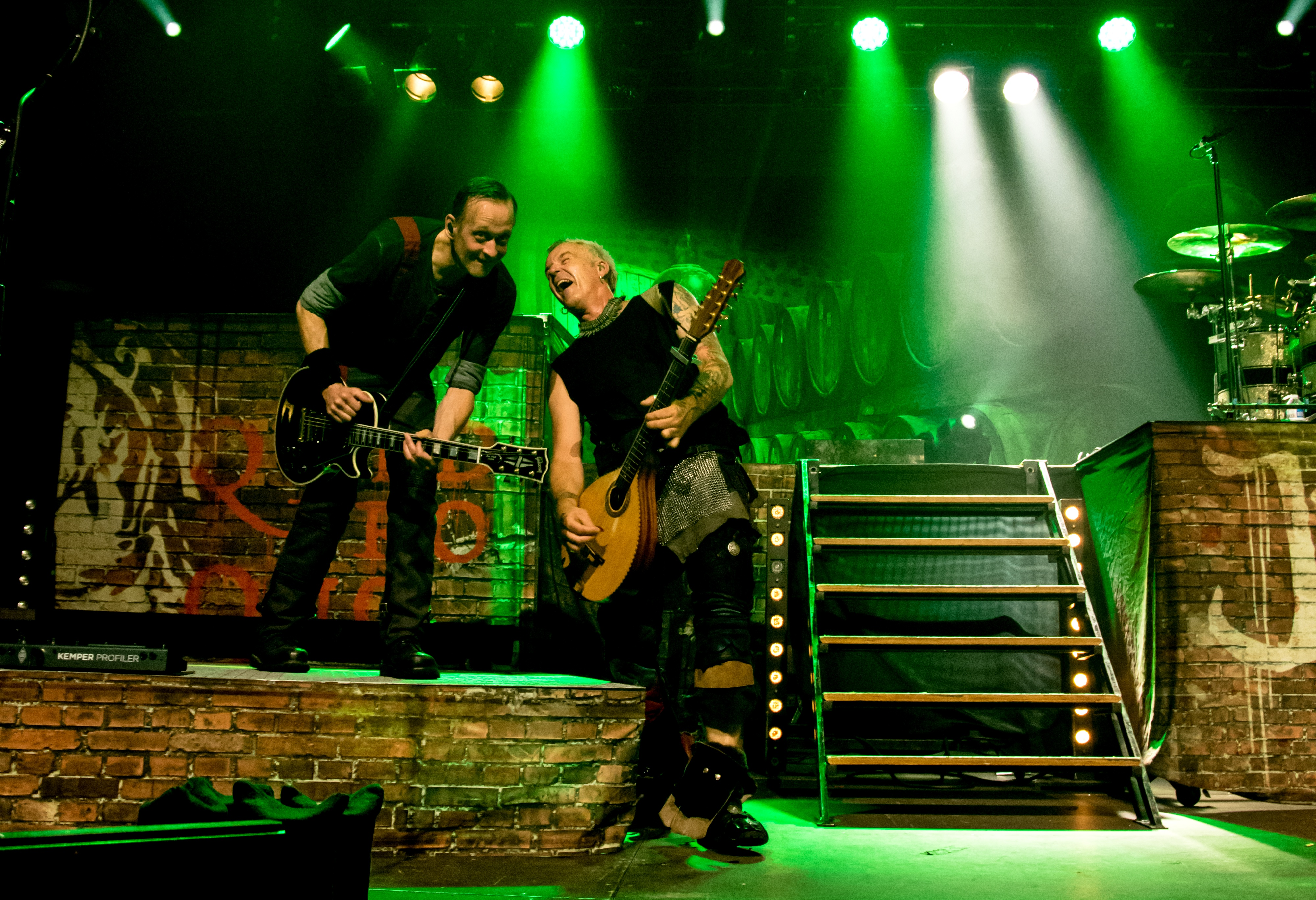 Bilder vom Zelt Musik Festival 2018 in Freiburg im Breisgau In Extremo am 29.07.2018 im Zirkuszelt